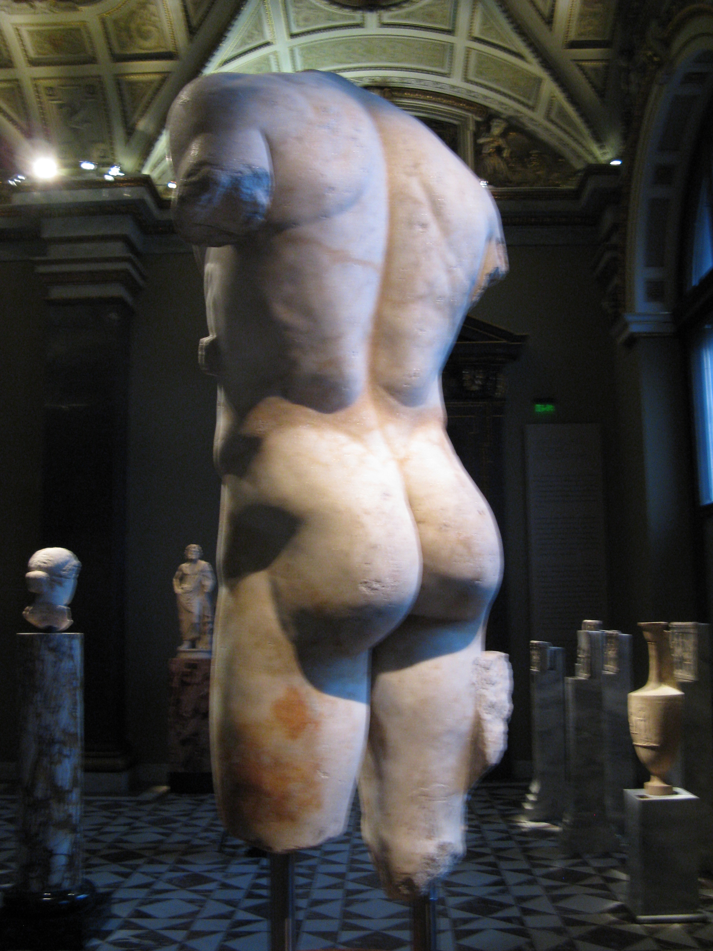 Torso des Speertragers at Kunsthistorisches Museum.